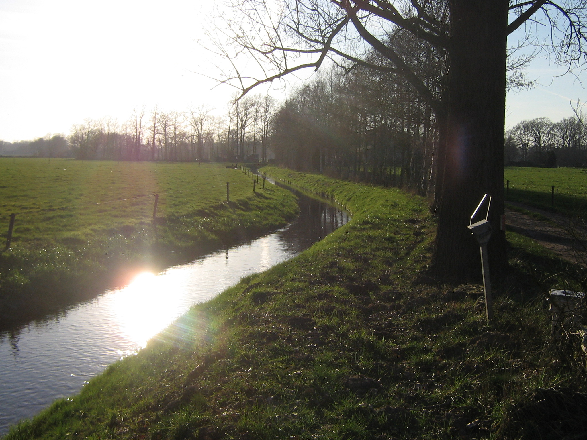 Zelfgemaakte foto